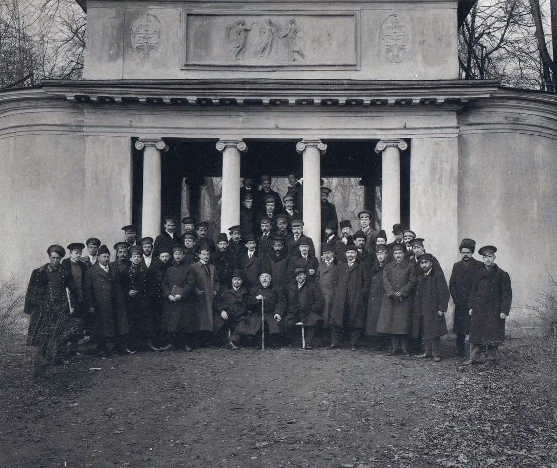 В саду психиатрической клиники Московского университета. В центре — В.П. Сербский